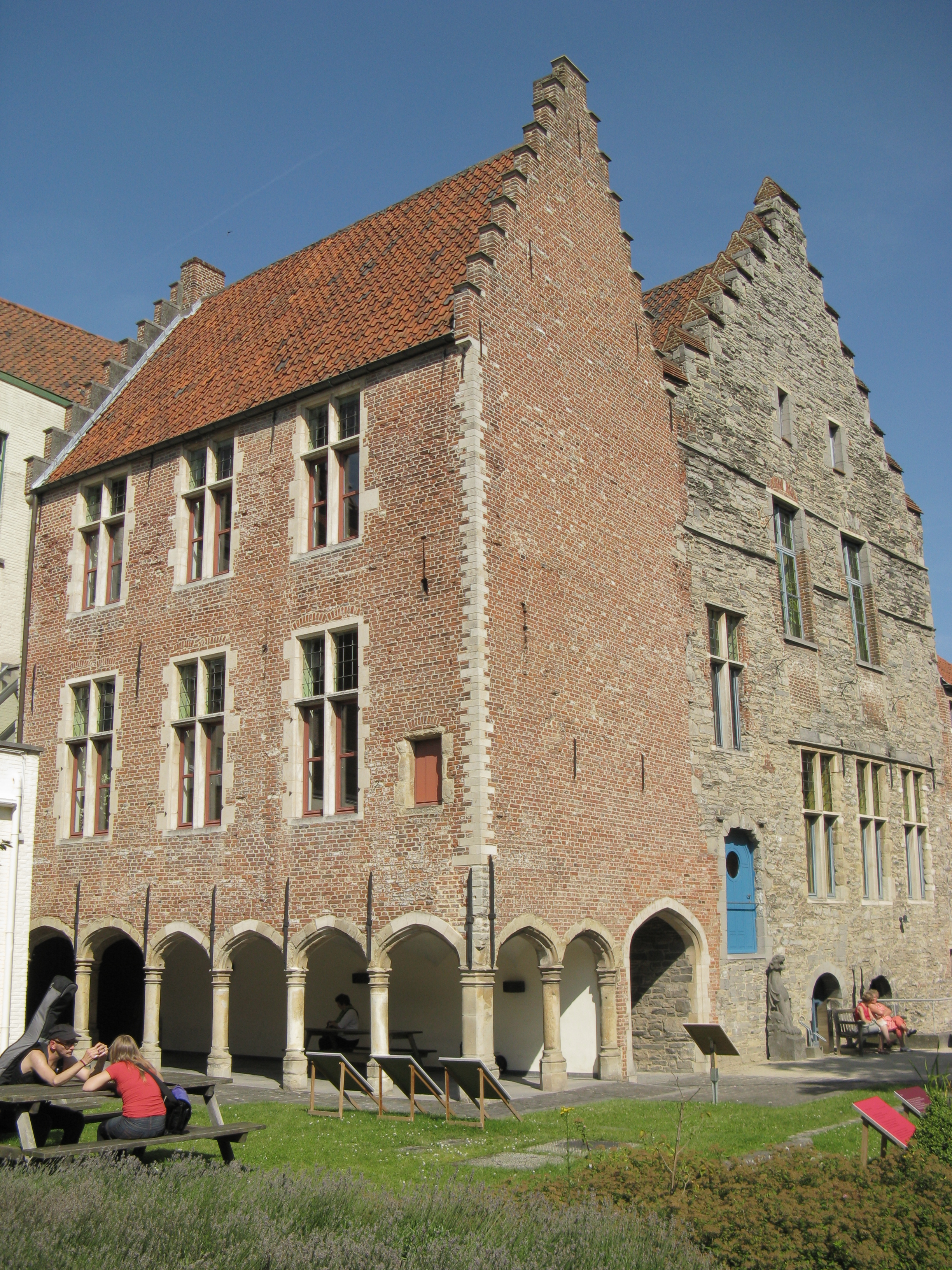 Hof van Ryhove, Onderstraat, Gent